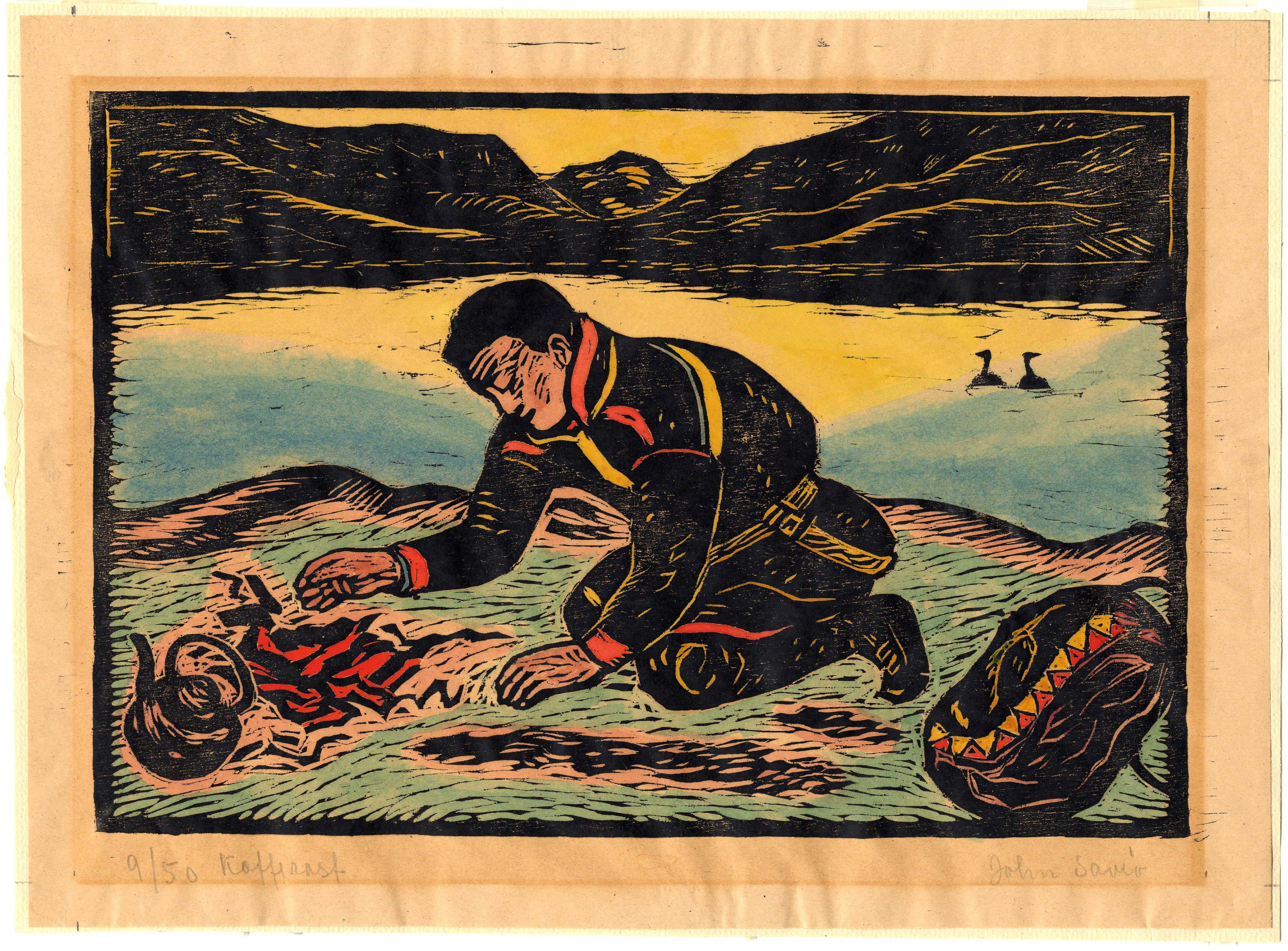 Sommerscene der den koftekledd mann sitter på kne på bakken og gjør opp bål. Ved bålet ligger en kaffekjele og en sekk. Vann med to svaner, fjell og himnel i bakgrunnen.